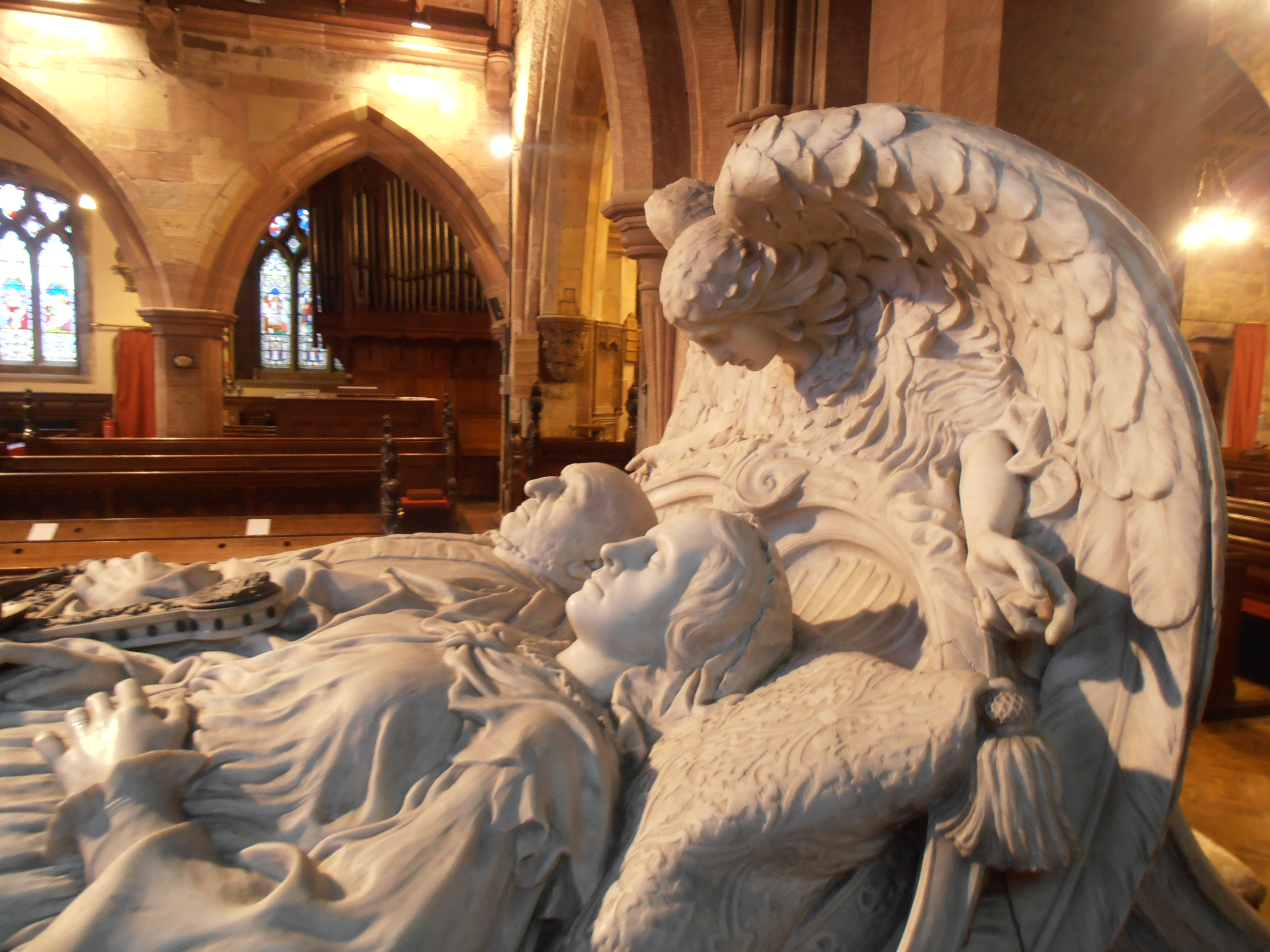 Eglwys Sant Deiniol / St Deiniol, Penarlâg, Sir y Fflint. Yma y mae cofeb W E Gladstone. Adeilad graddedig ll*.